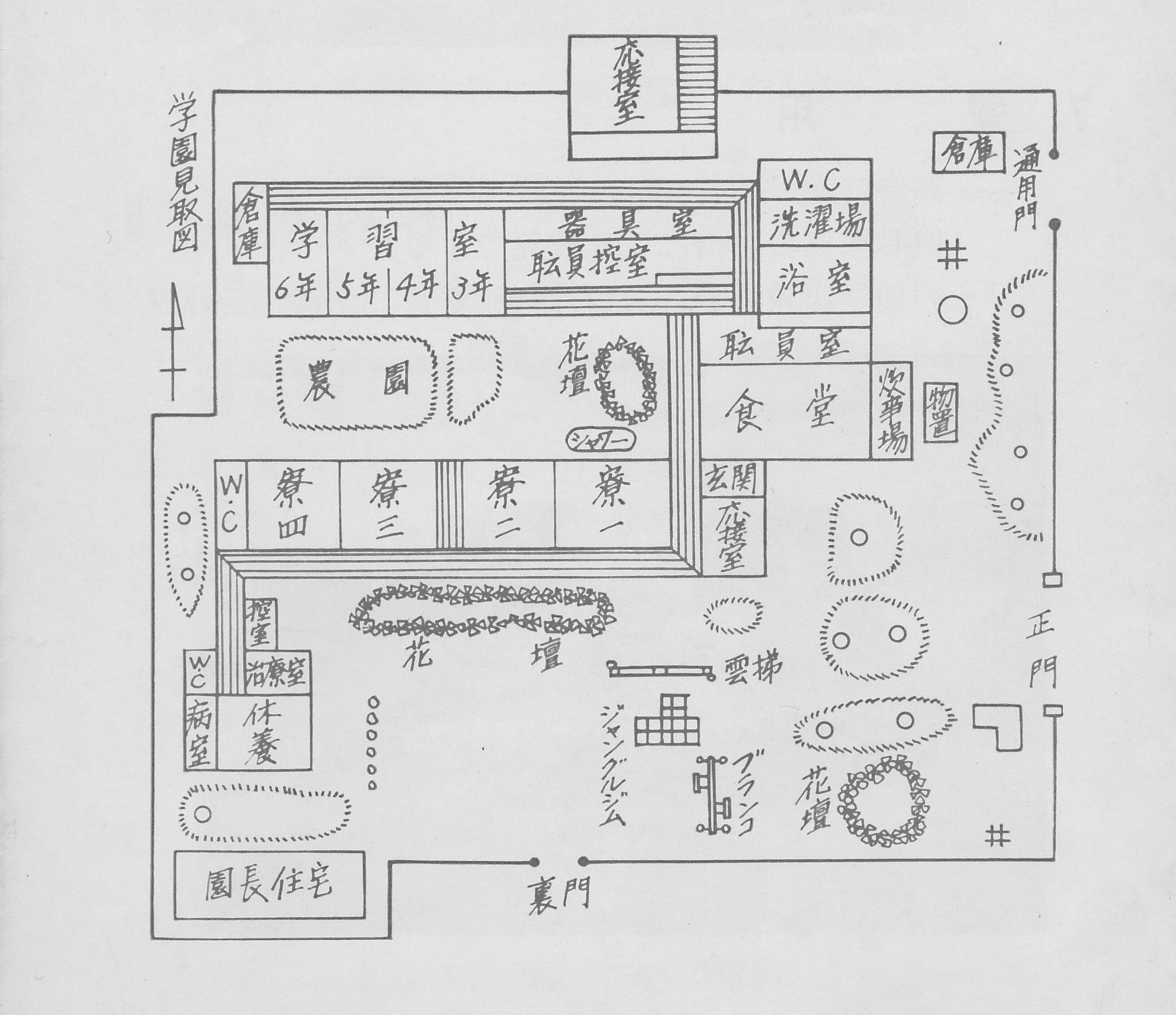 廃園となった養護施設に関する入園案内パンフレット抜粋